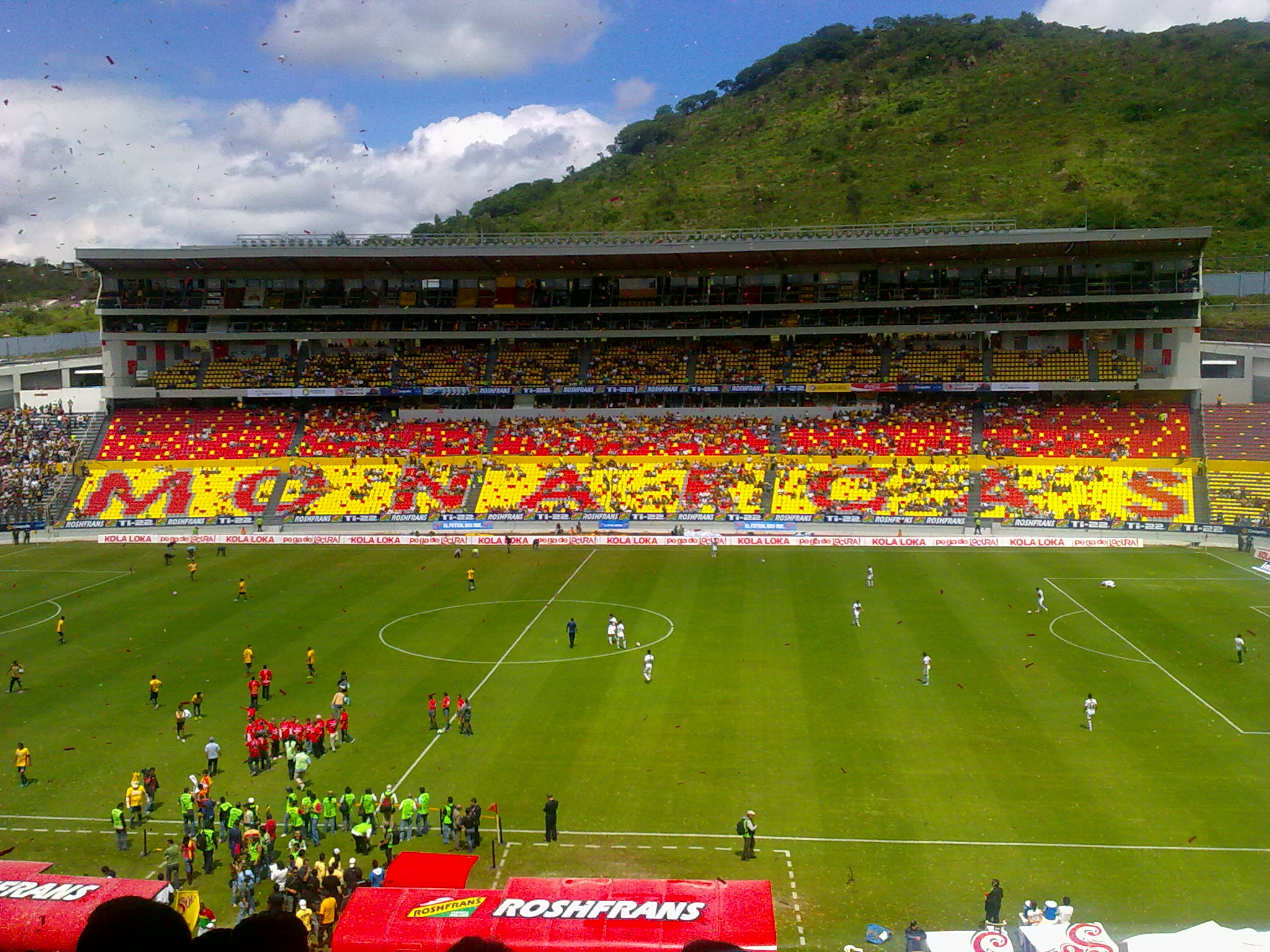 Estadio Morelos, remodelación 2011